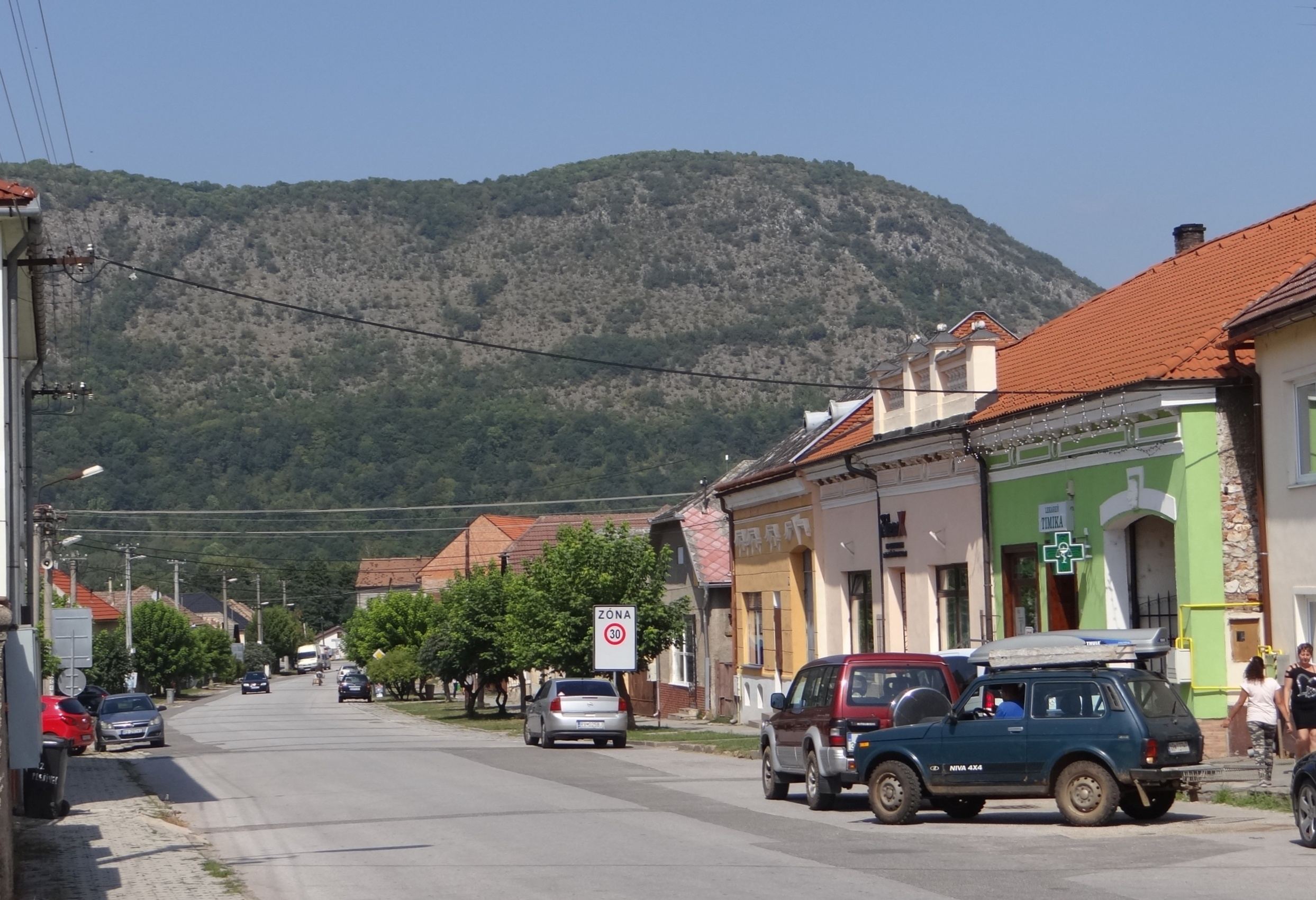 Plešivec